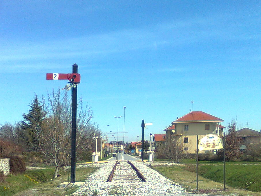 Ricostruzione di un tratto della linea Cuneo-Boves-Borgo San Dalmazzo comprendente un passaggio a livello e una coppia di segnali semaforici di seconda categoria sulla vecchia sede riutilizzata come strada carrozzabile.